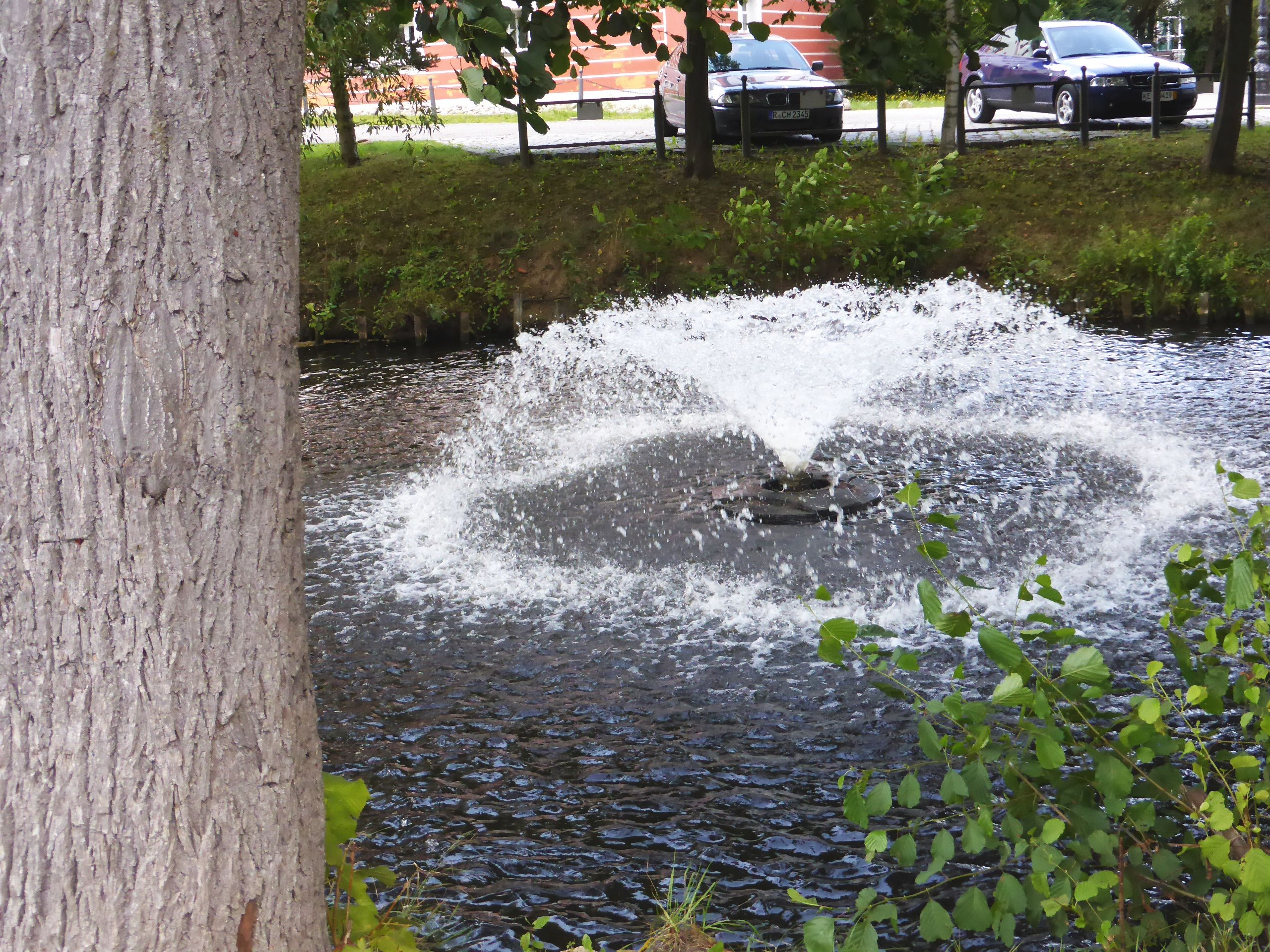 Wasserschloss Gebelkofen